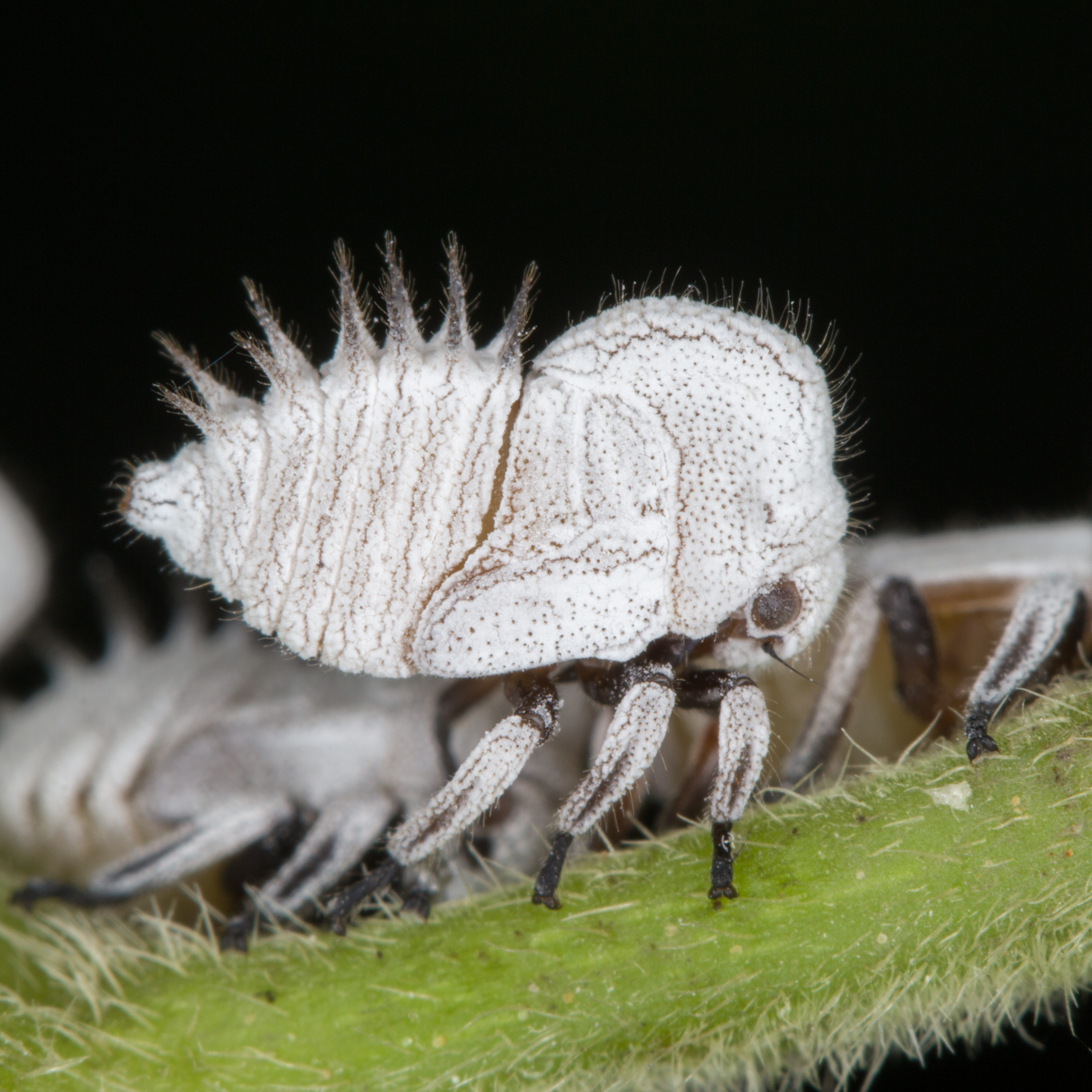 Membracis dorsata